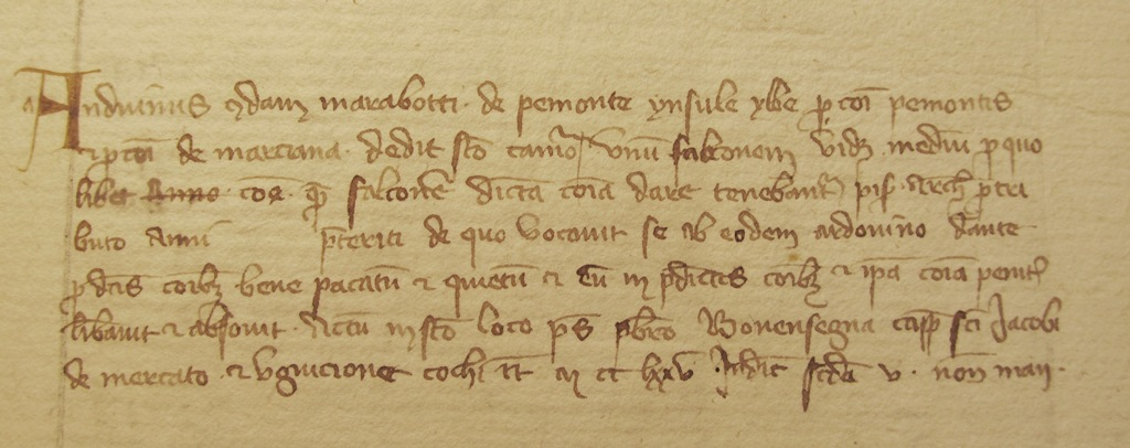 Documento medievale (1260) su Pedemonte